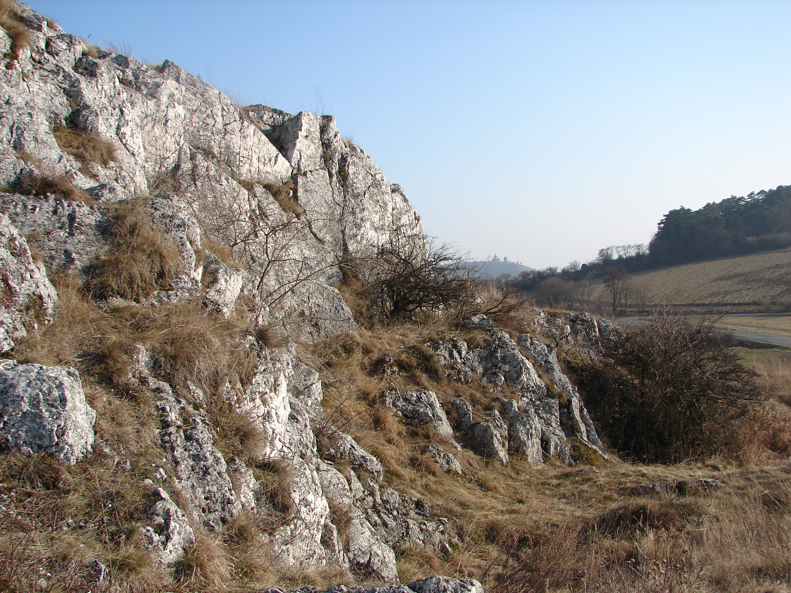 Charakter PP.